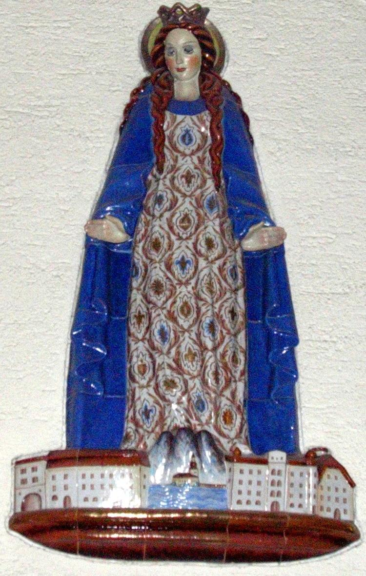 Stadtpfarrkirche Gmunden; Keramikfigur